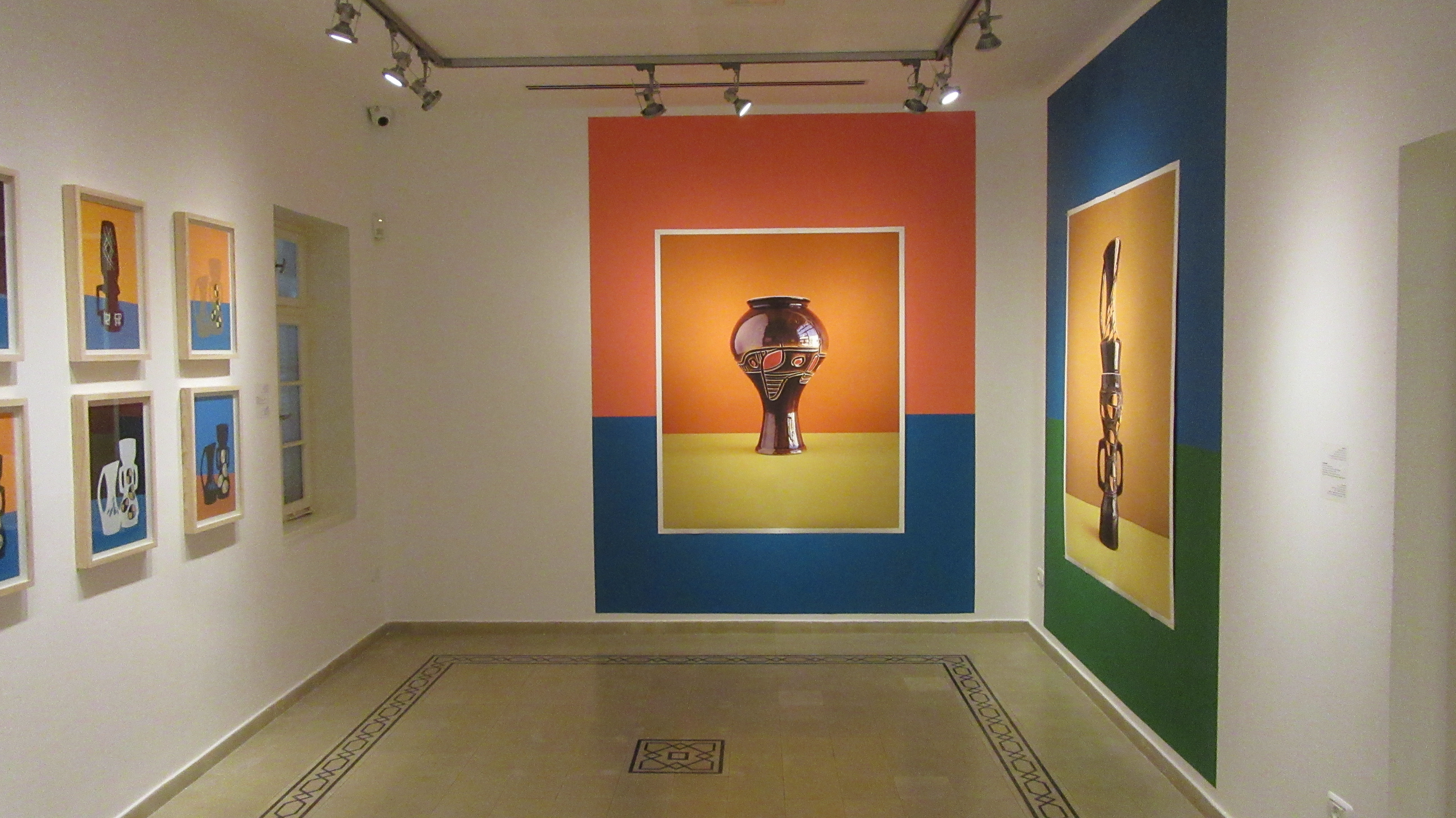 תצוגת עבודות של דוד עדיקא בתערוכה "הדפס להמונים" במוזיאון הרמן שטרוק, חיפה